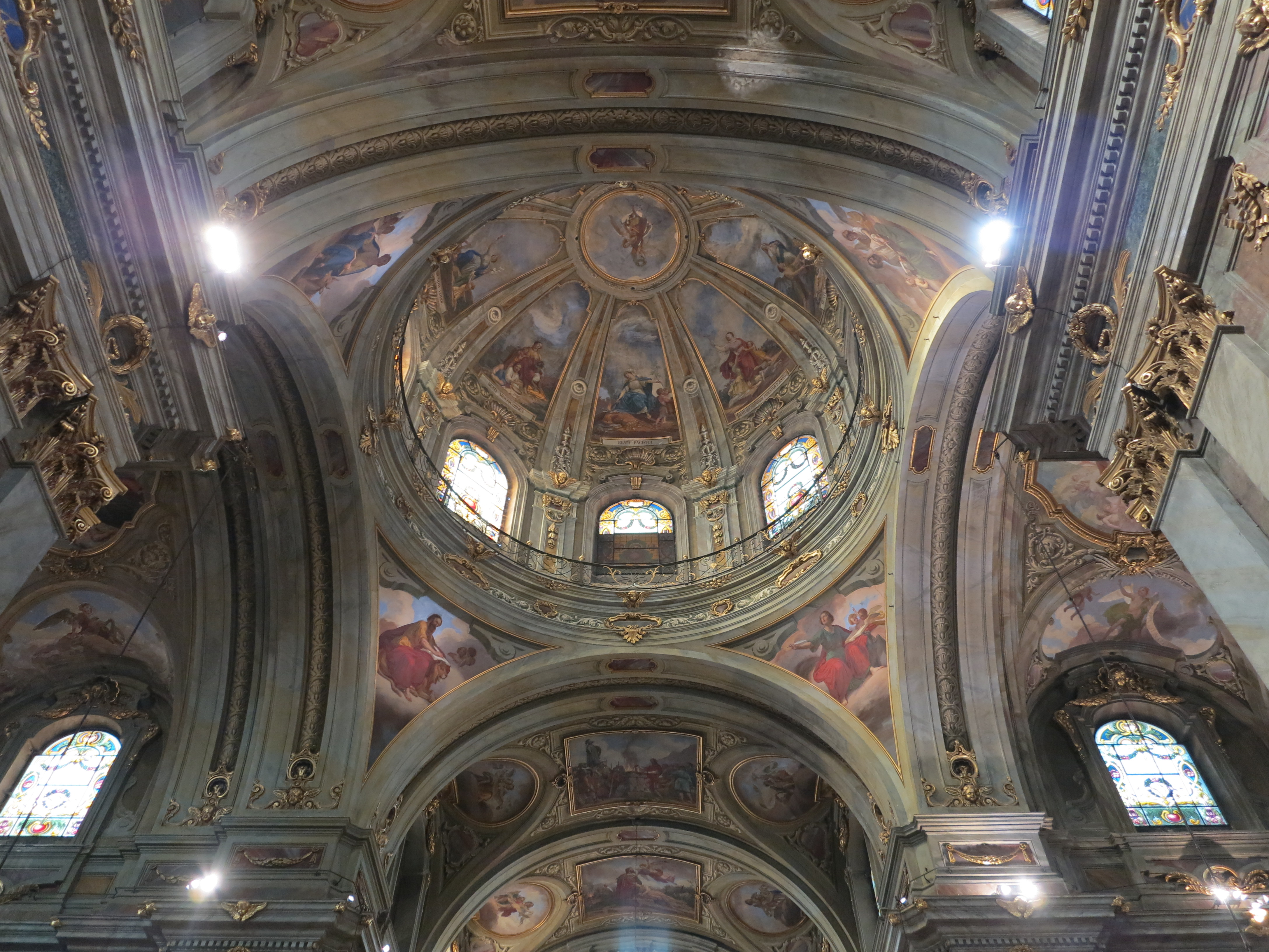 Cupola interna della cattedrale di Fossano